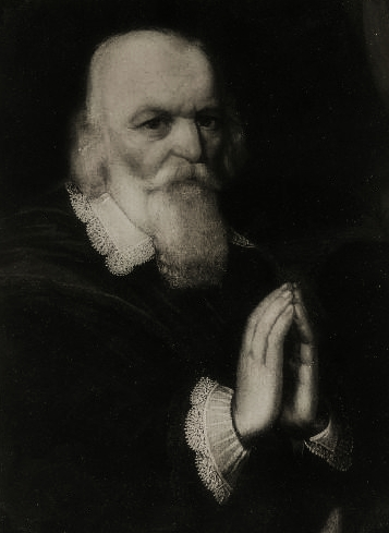 Portrait of Bogislaus von Rosen (1572-1658)